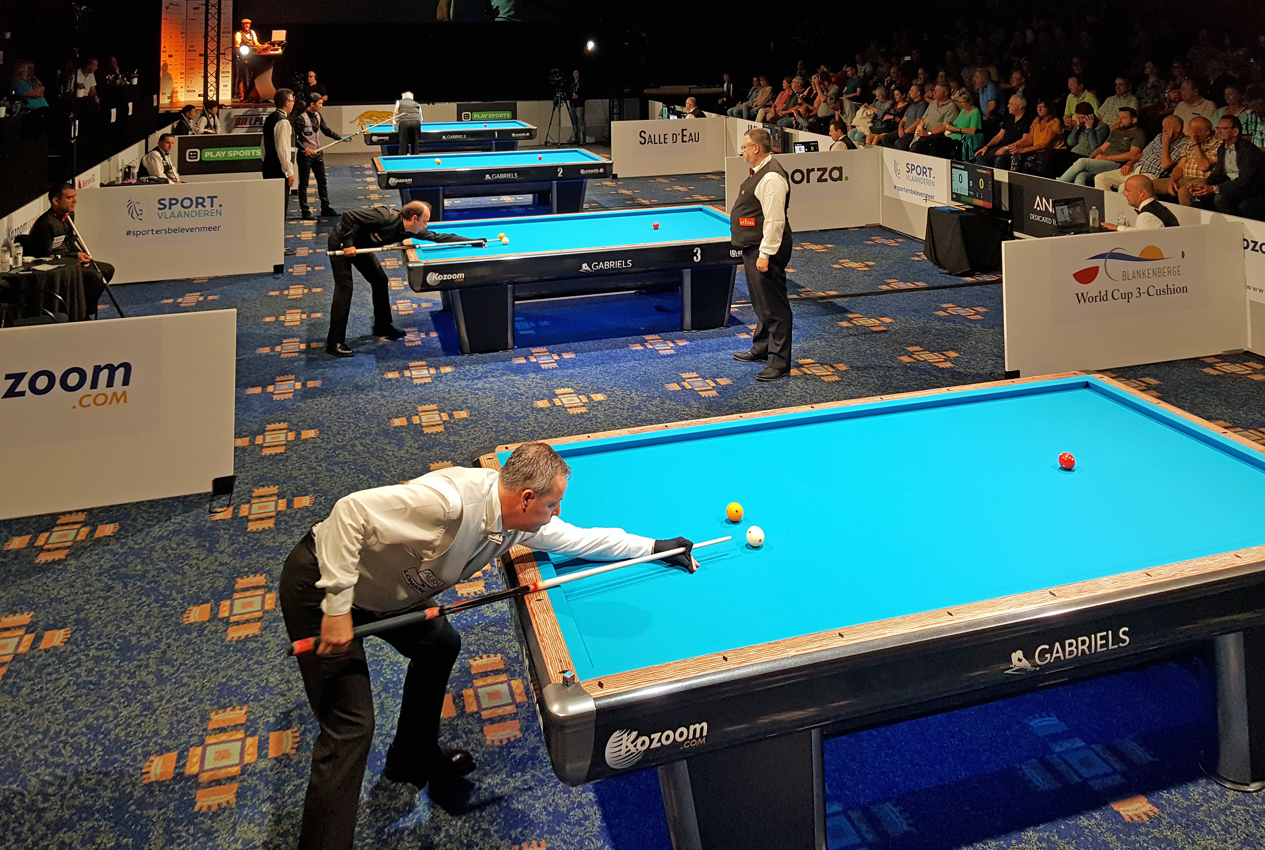 Carambolage Dreiband-Weltcup 2018/3.